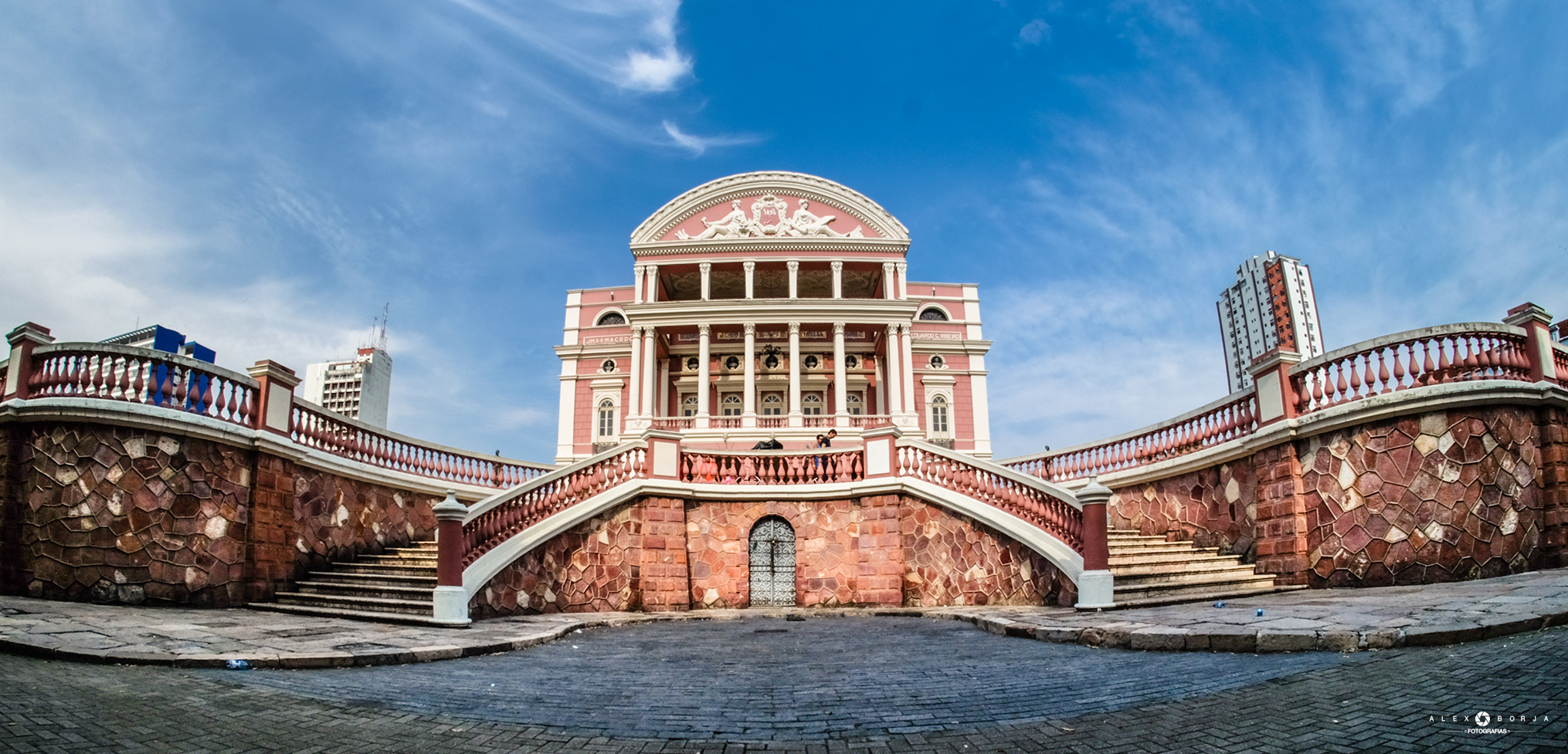 Vista frontal do Teatro Amazonas. No dia 31 de Dezembro de 2016 o Teatro comemorou seus 120 anos de histórias e espetáculos. A fachada desde sua construção nunca sofreu nenhuma alteração.